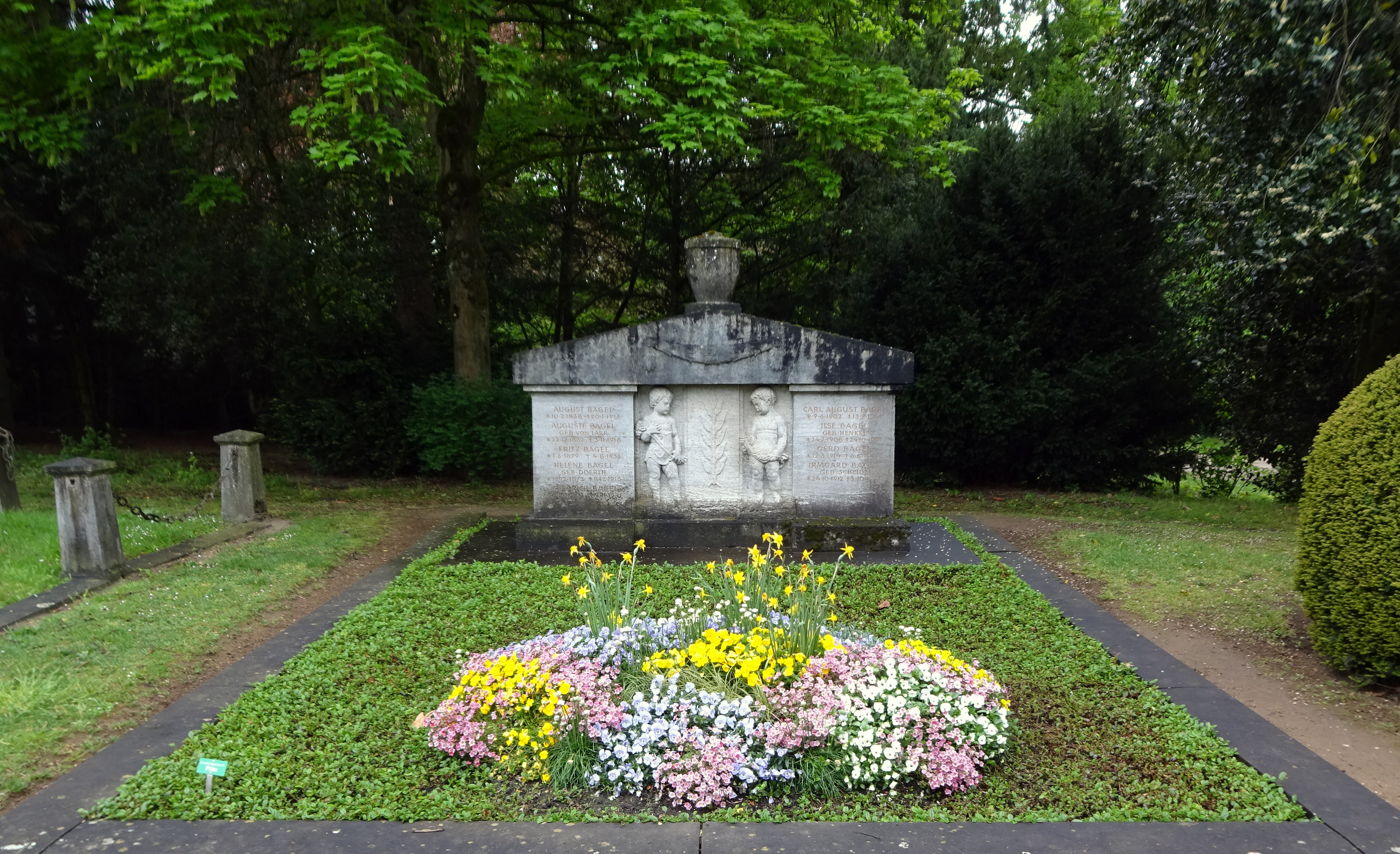 Grabstätte Bagel auf dem Millionenhügel Nordfriedhof Düsseldorf